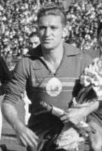 ADN-ZB/Agerpress 10.11.1952 Rumänien schlug DDR-Auswahl 3:1 Am 26. Oktober spielte die Fußballmannschaft der Rumänischen Volksrepublik gegen die DDR-Auswahlmannschaft im Bukarester Stadion der Republik vor einer begeisterten Zuschauer-menge von über 40.000 Menschen. Das Spiel endete mit einem 3:1- Sieg der rumänischen Fußballmanschaft. UBz: Die Mannschaften der Rumänischen Volksrepublik und der deutschen Demokratischen Republik treffen auf dem Spielfeld ein. Information added by Wikimedia users. Iosif Petschovschi, at the opening of the Romania-DDR football match in 1952